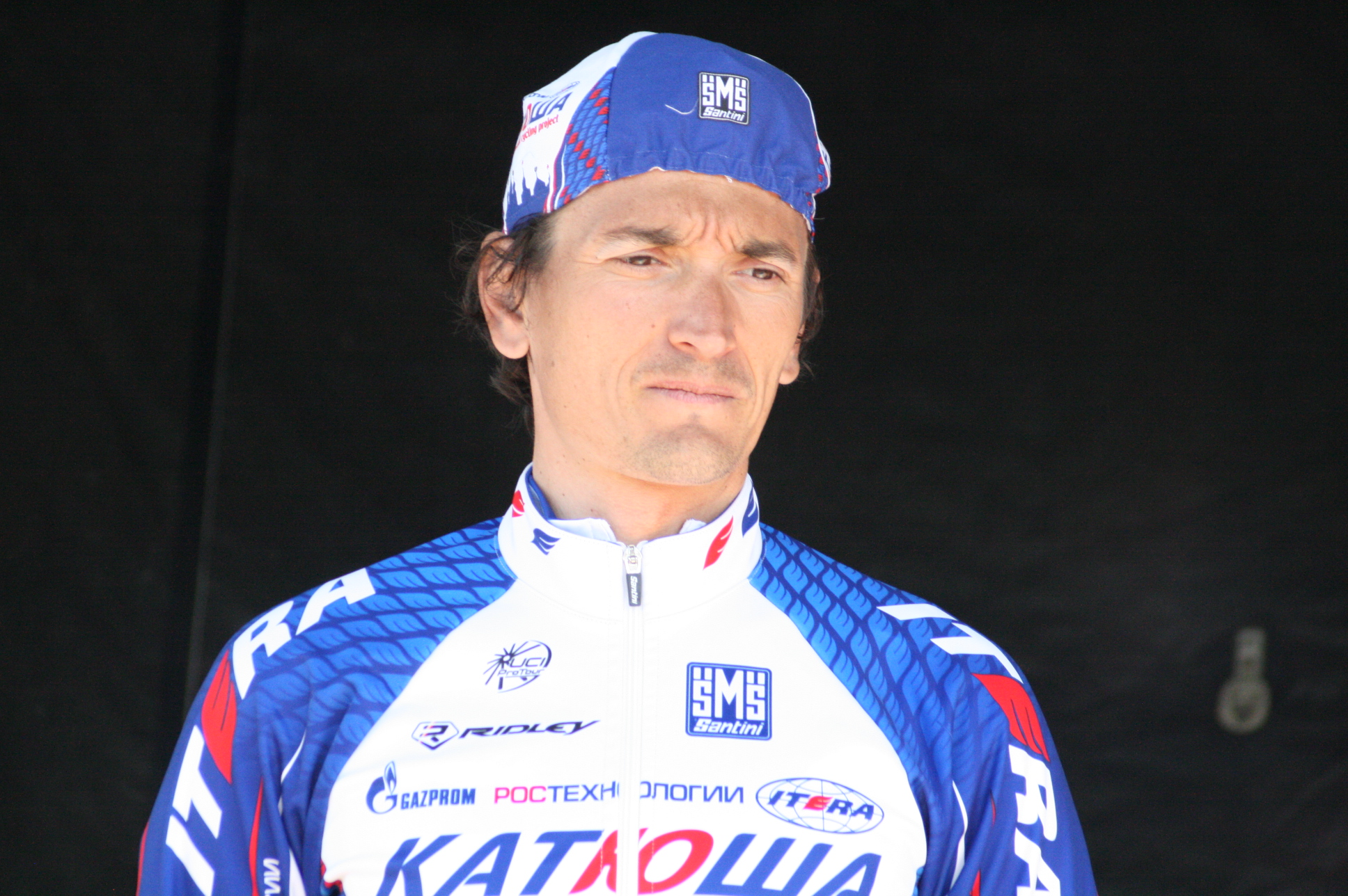 Mikhailo Khalilov lors de la présentation des équipes des 4 jours de Dunkerque